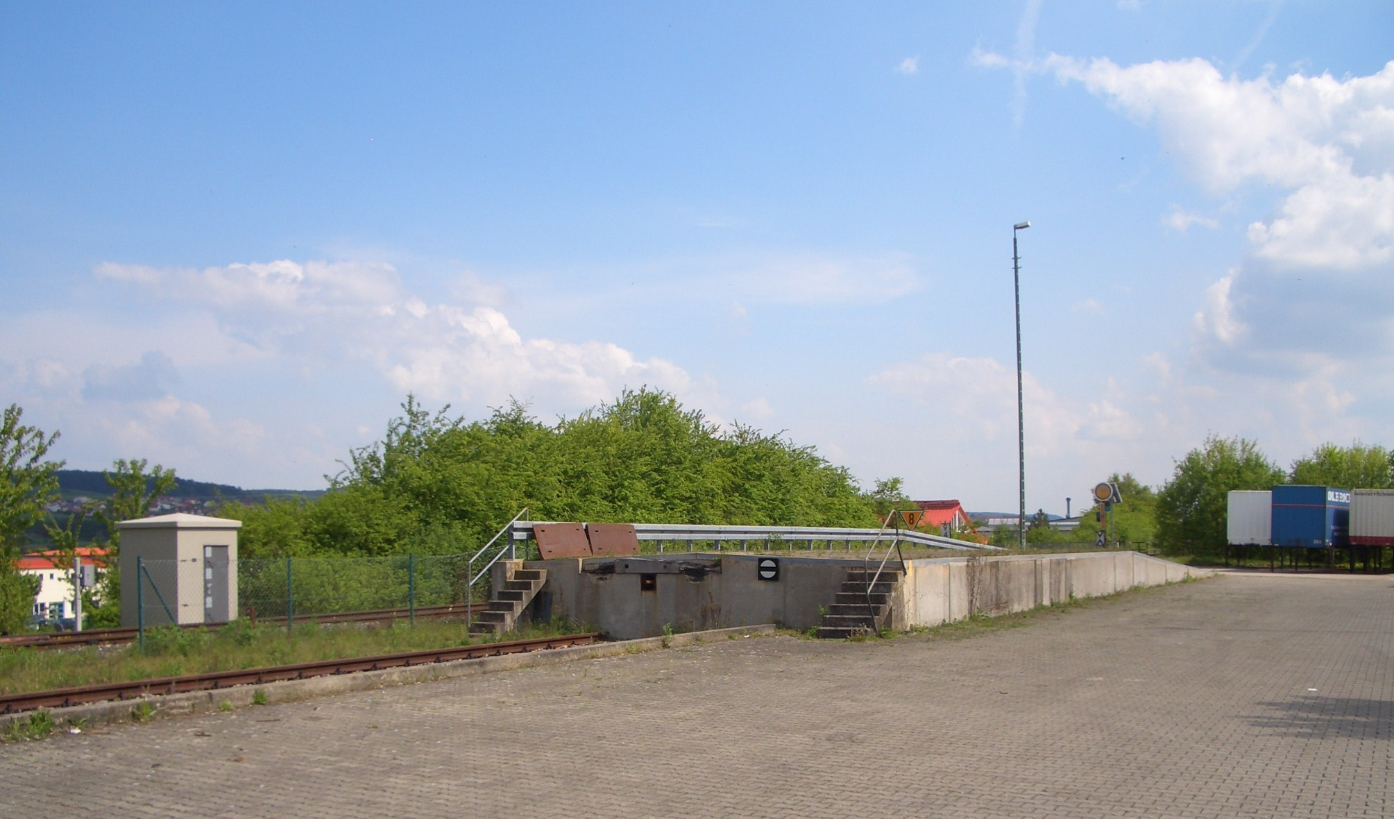 Tauberbischofsheim, Bahnhofsteil Awanst Tauberbischofsheim-Nord mit der Kopframpe Auffahrt, Blick Richtung TTB